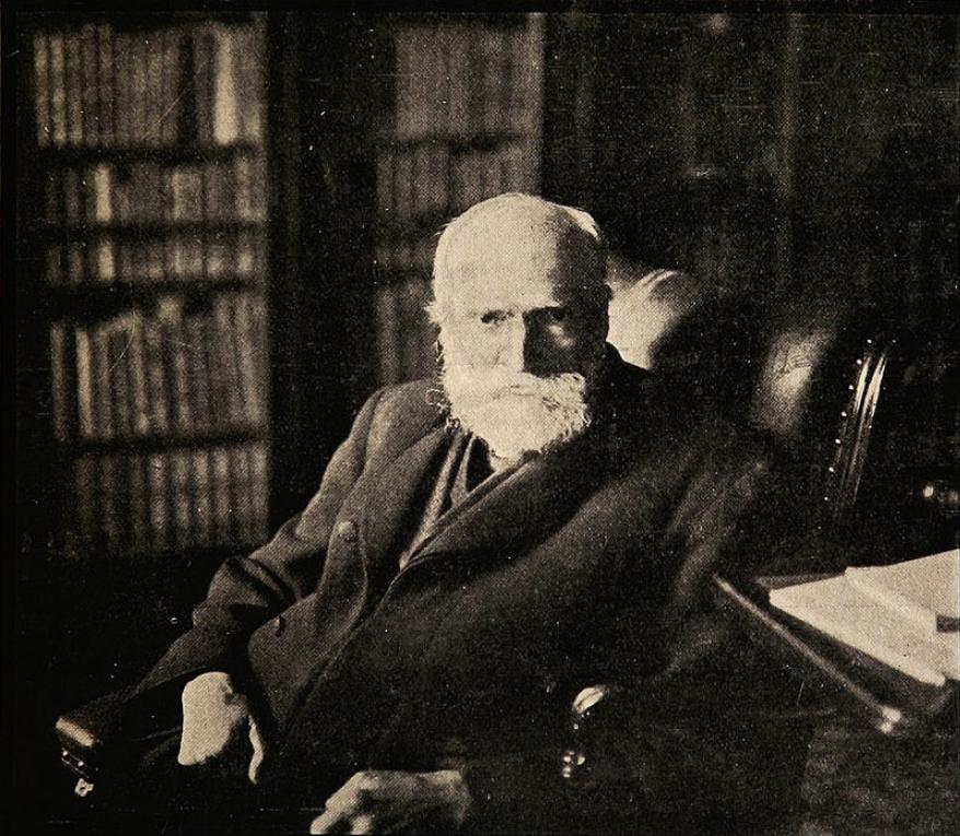 "El último retrato del sabio maestro Don Diego Barros Arana".